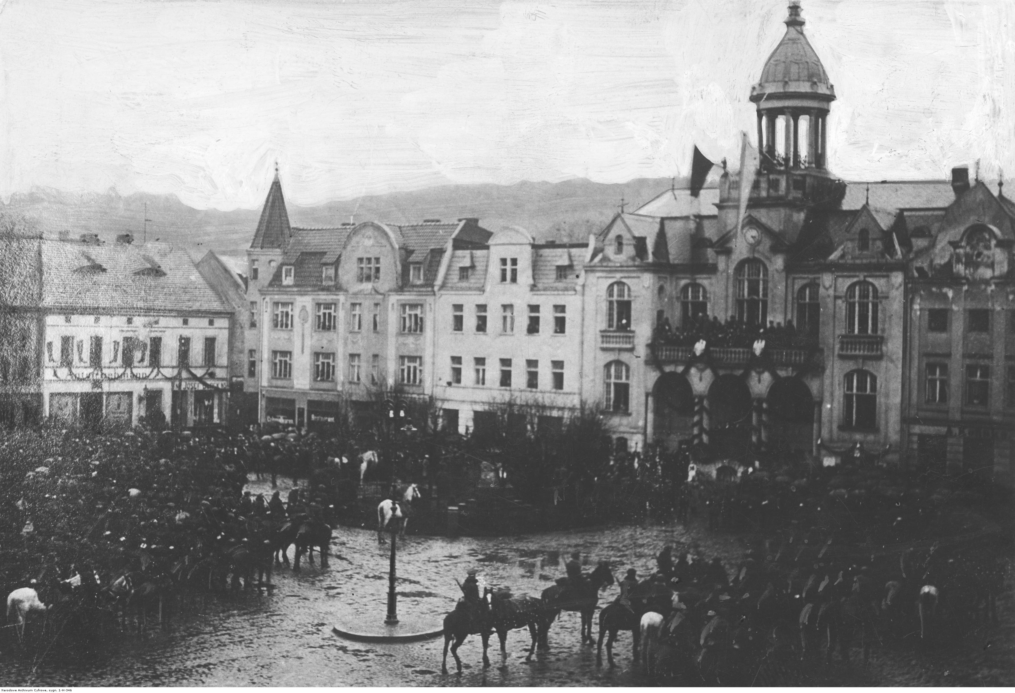 Wkroczenie wojsk polskich do Wejherowa.